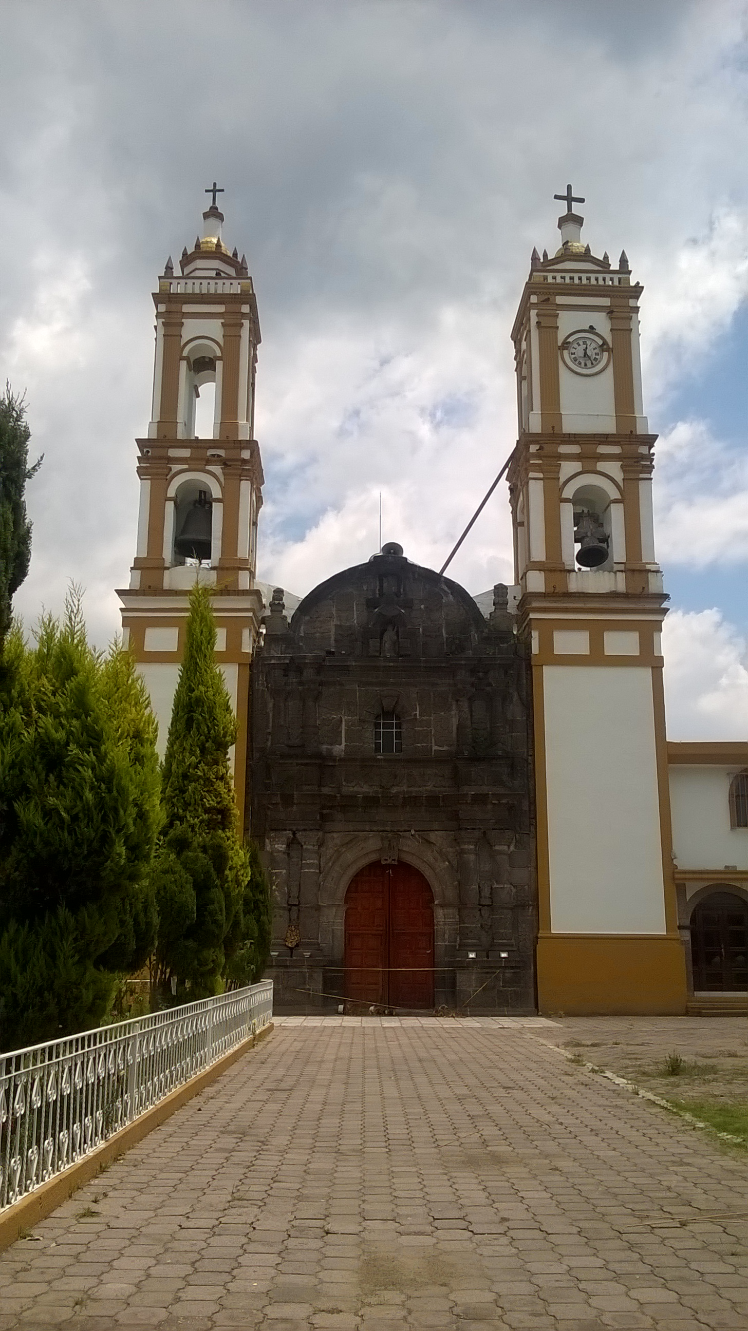 Templo de Santa Catarina Ayometla, Tlaxcala